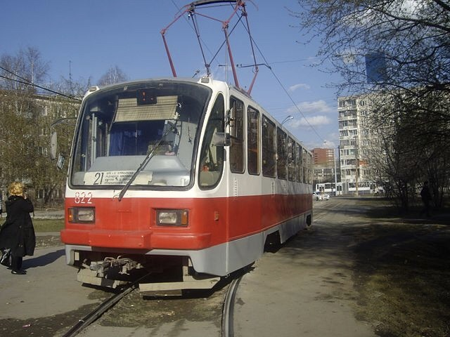 (21 маршрут)